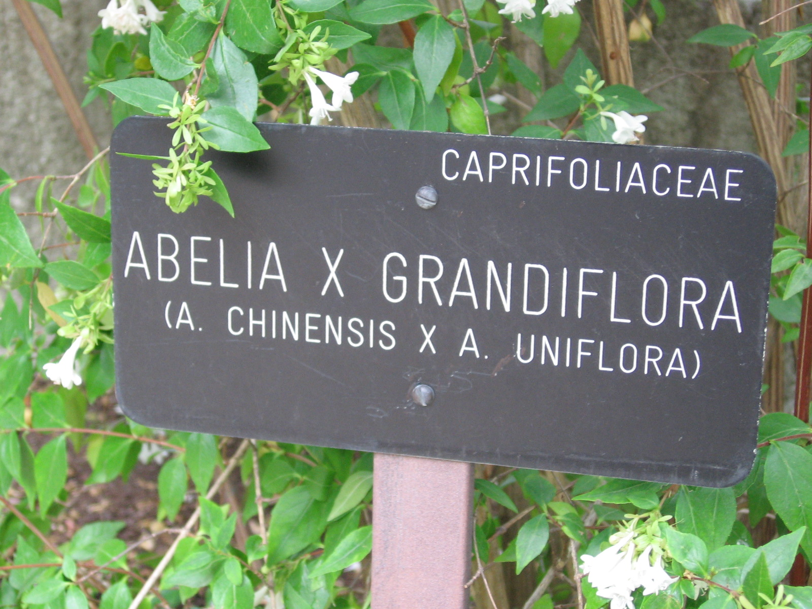 Abelia x grandiflora. Foto tomada en el RJB de Madrid